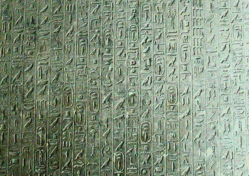 Pyramid text in Teti pyramid in Saqqara, Egypt